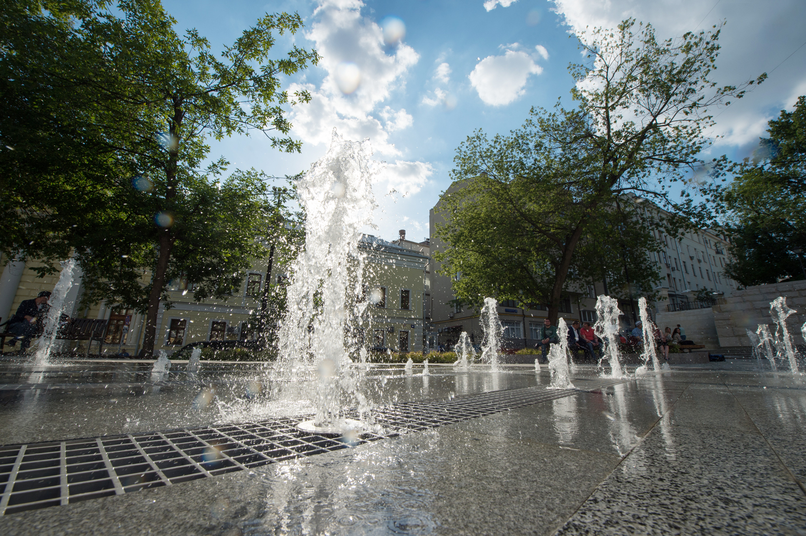 Парк Горка. Фонтан